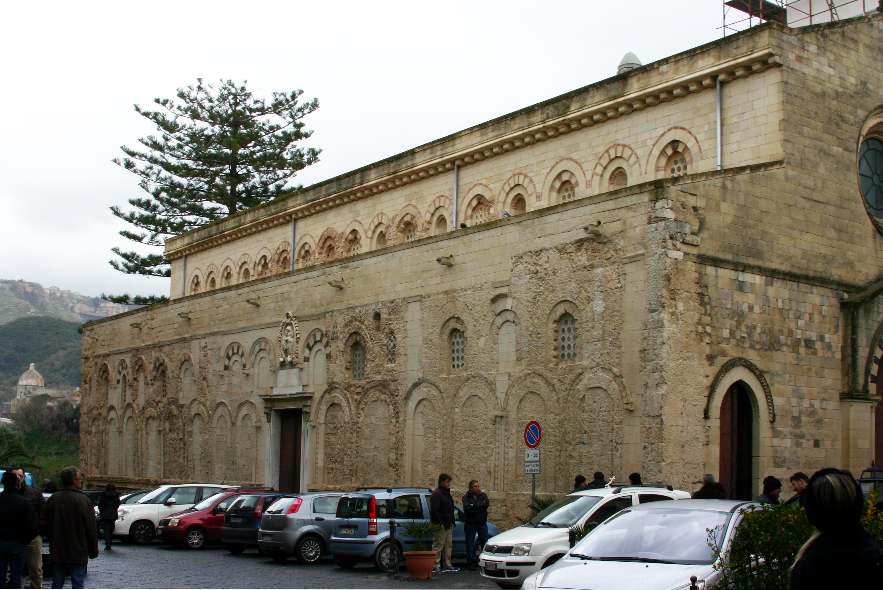 Duomo - Tropea